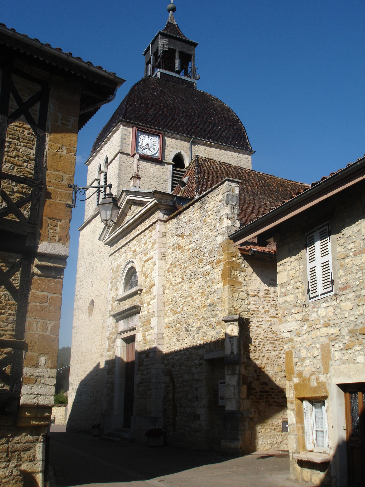 Meillonnas dans le département de l'Ain : le centre du village et l'église